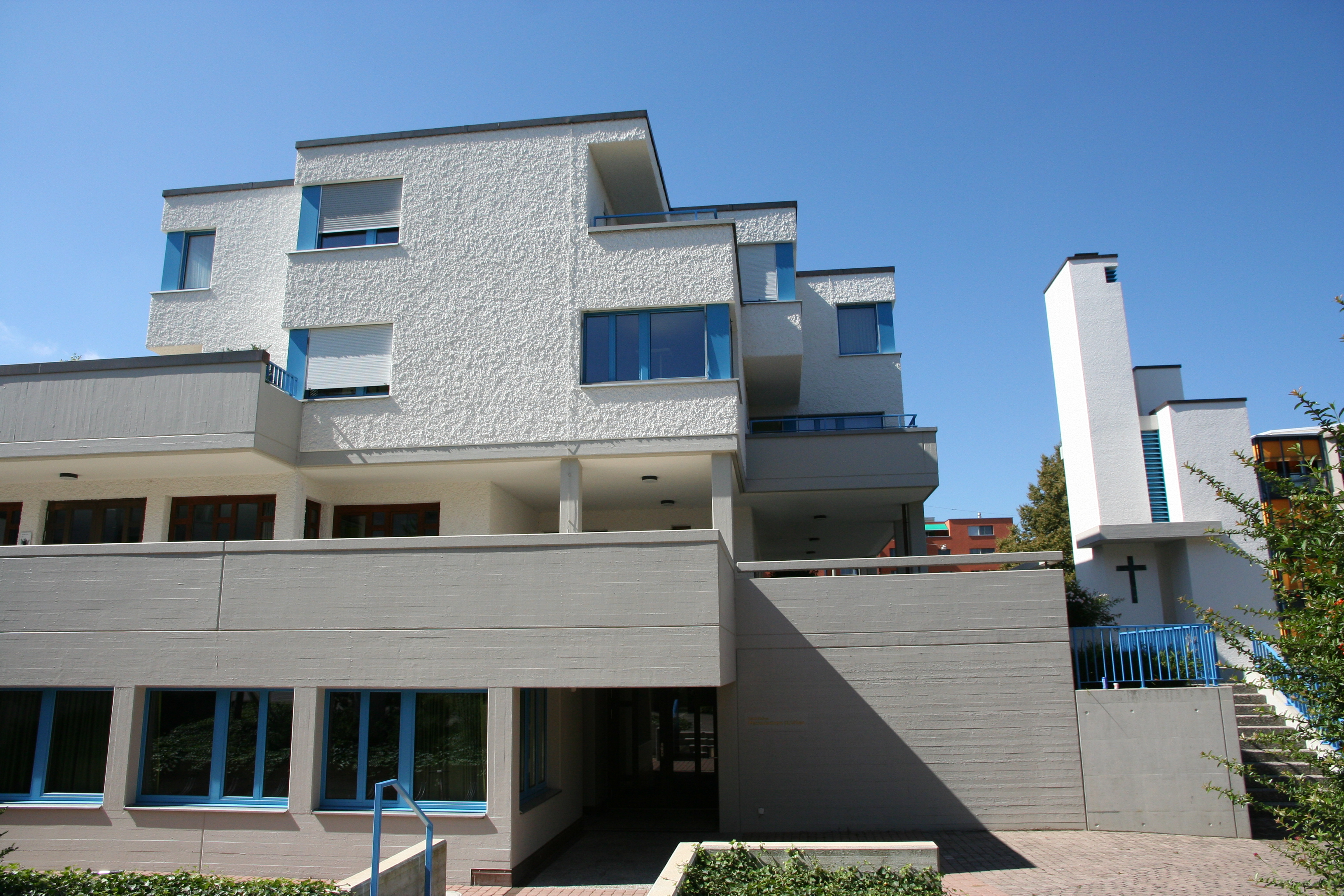 röm.-kath. Kirche St. Urban Winterthur-Seen